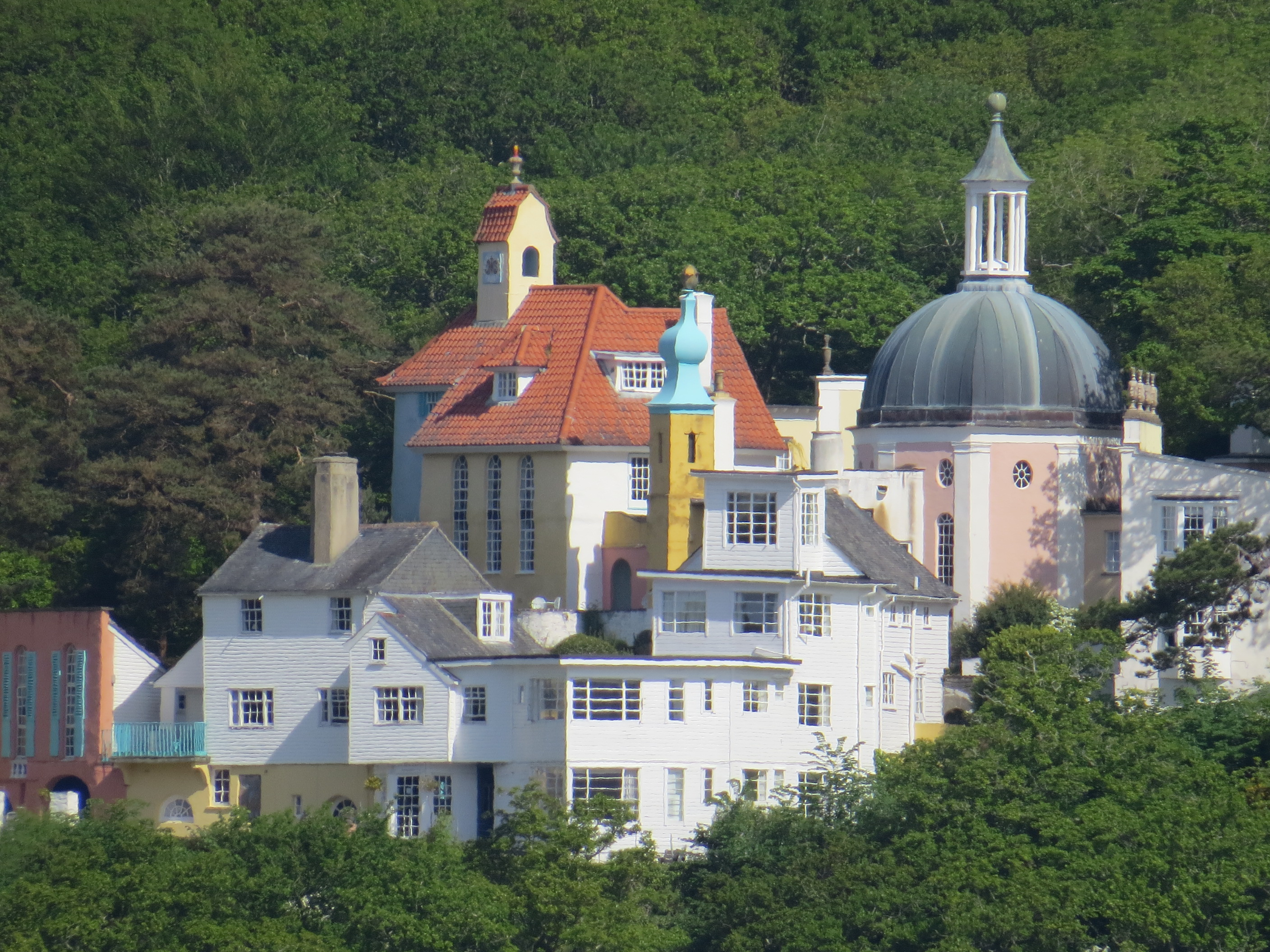 Portmeirion o Lanfihangel y Traethau